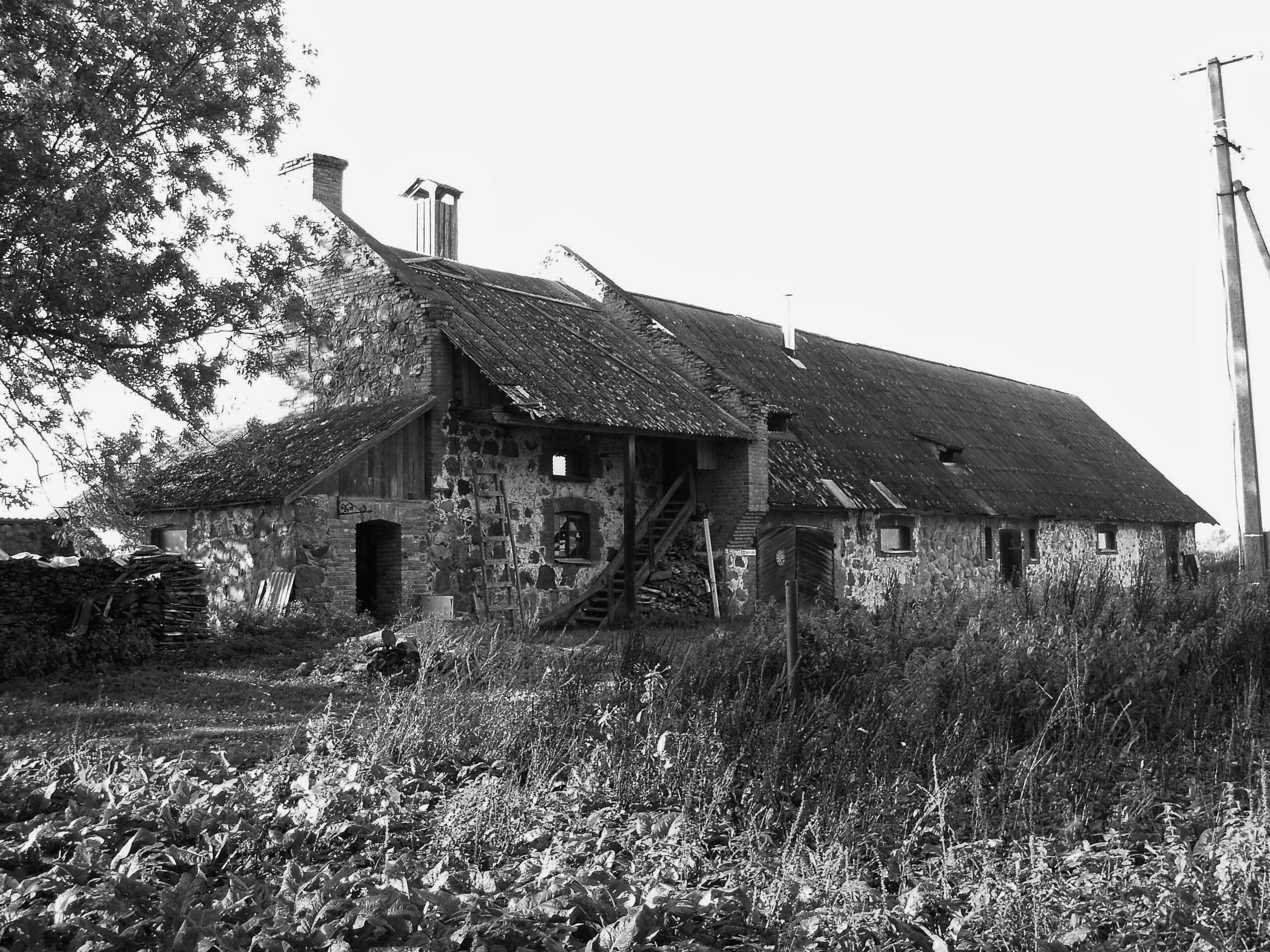 Maramaa mõisa ait-kuivati 2007. aastal